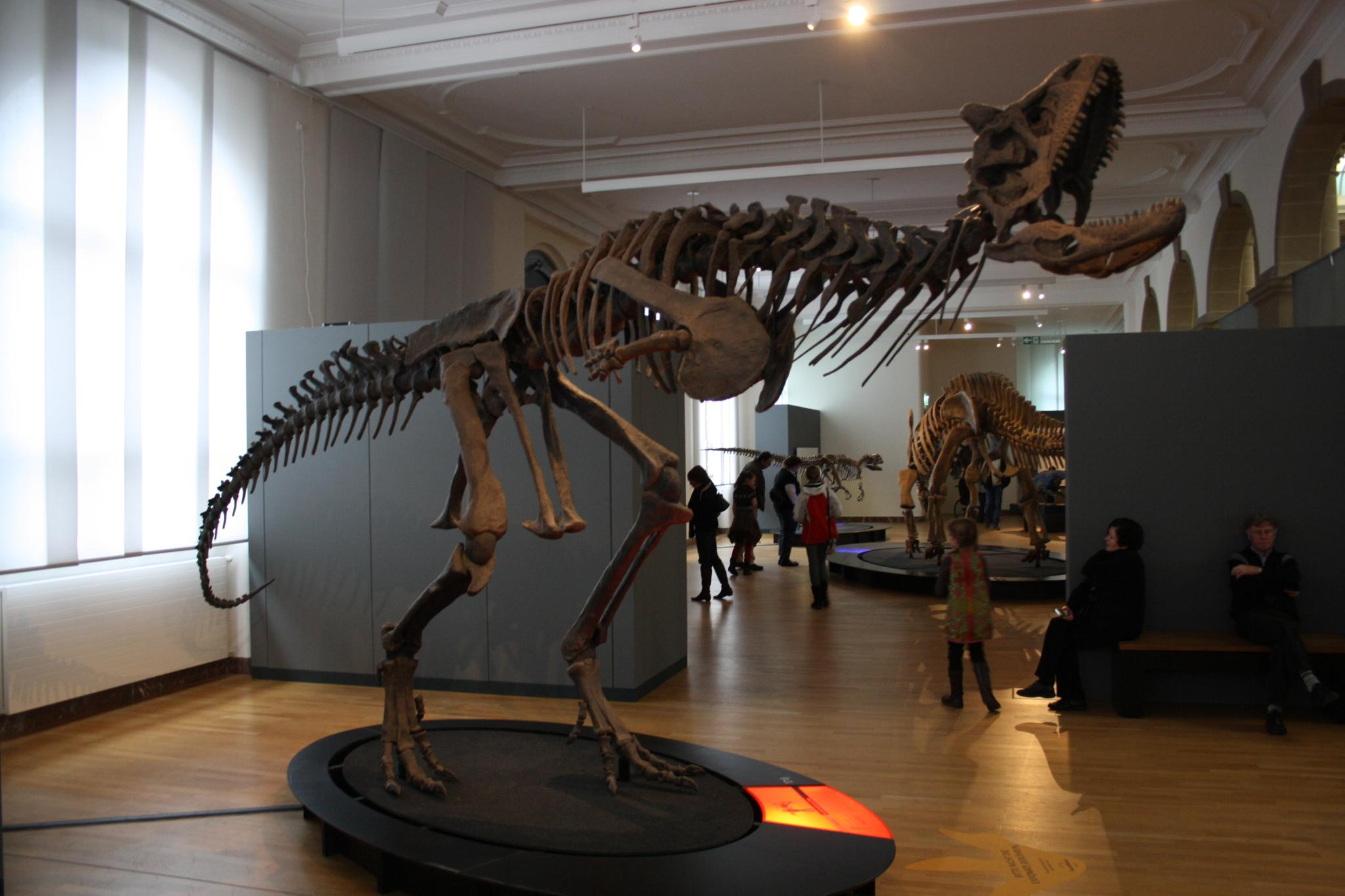 Carnotaurus exhibit in Bonn